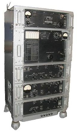 Wojskowy odbiornik radiowy AMUR-2. Zdjęcie pochodzi ze strony